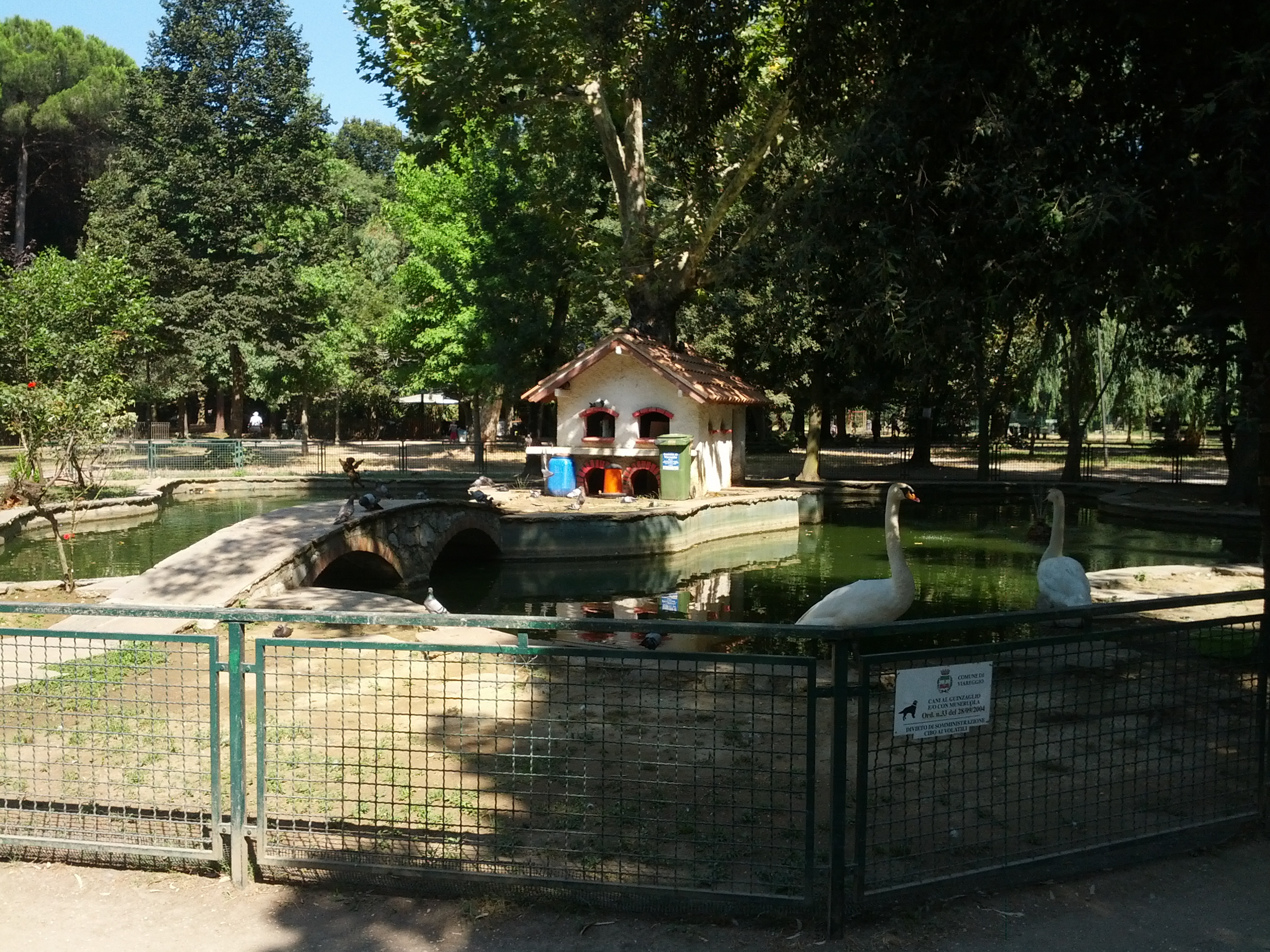 Viareggio, pineta, casa cigni